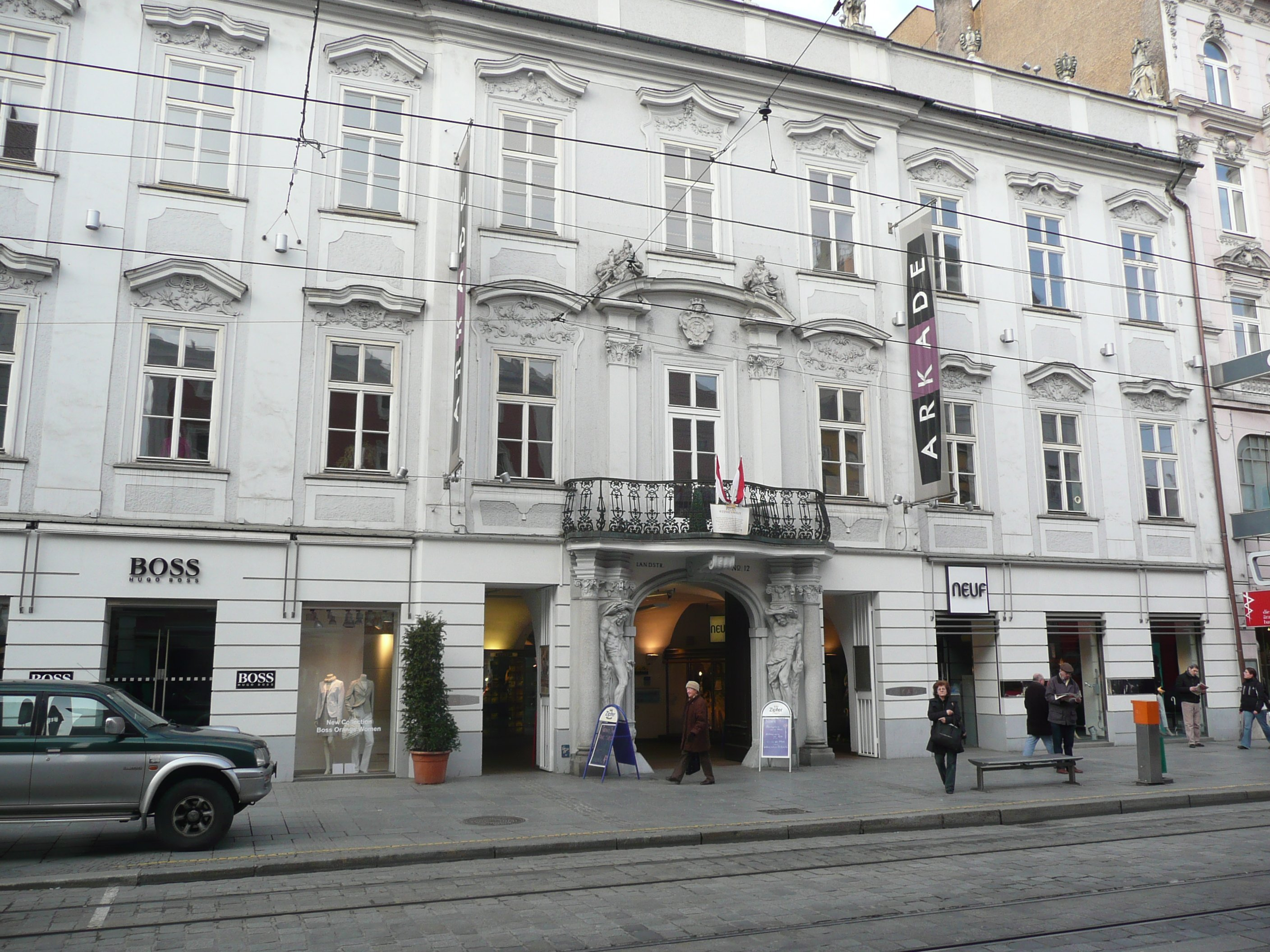 Linz - Palais Weißenwolff